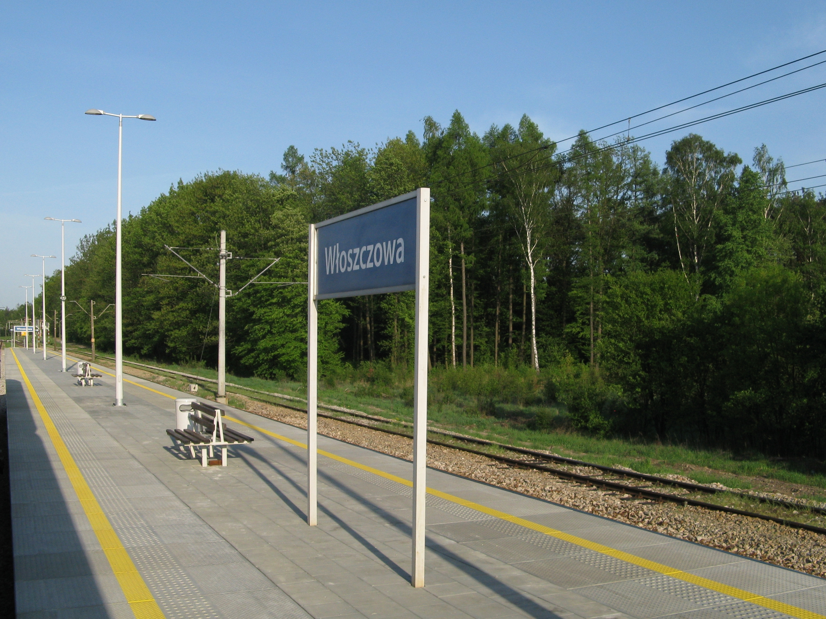 Przystanek kolejowy Włoszczowa.